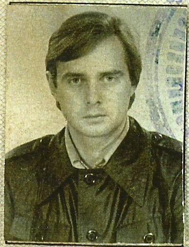 Peeter Ilus